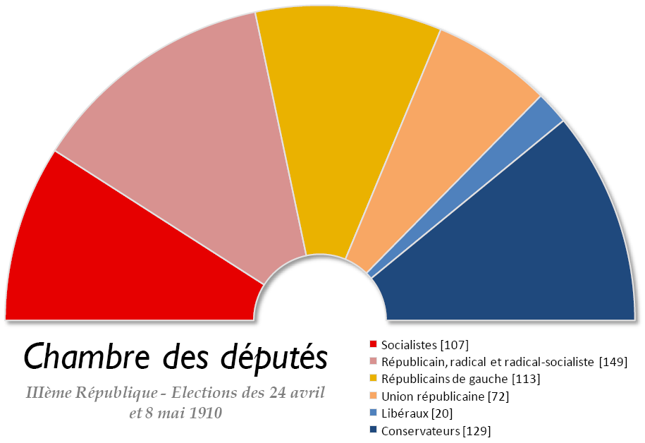 Chambre des députés française issue des élections législatives de 1910